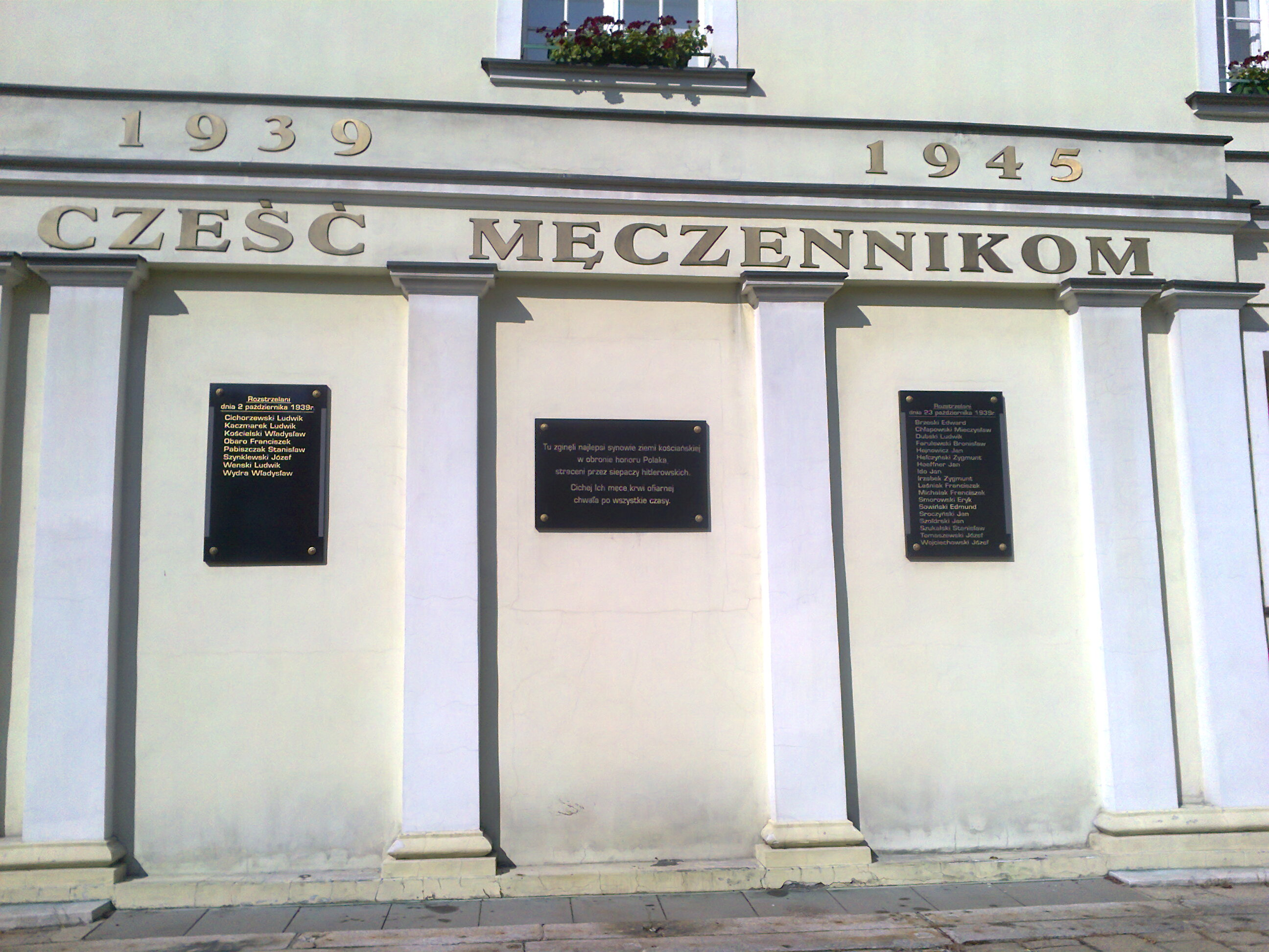 Miejsce egzekucji Polaków w Kościanie, Wielkopolska